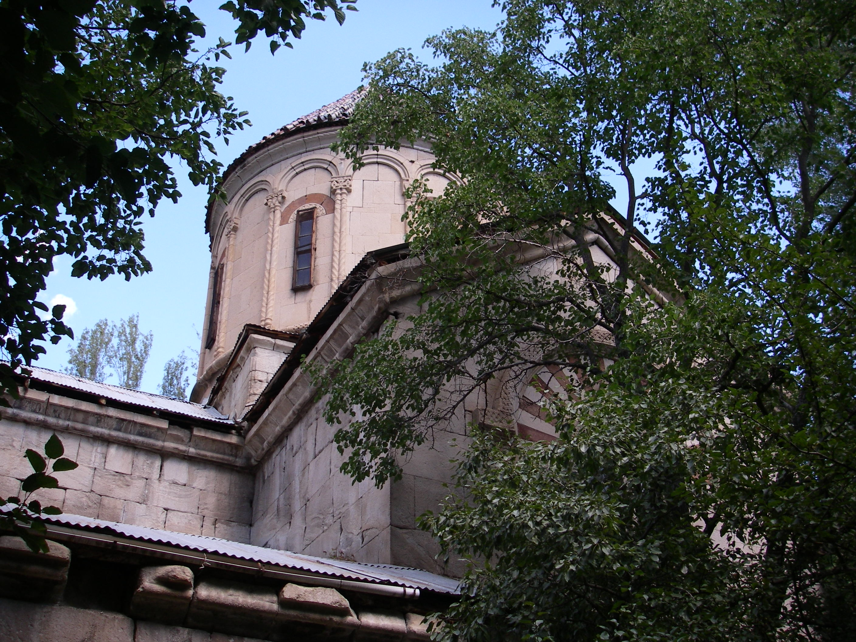 Haho